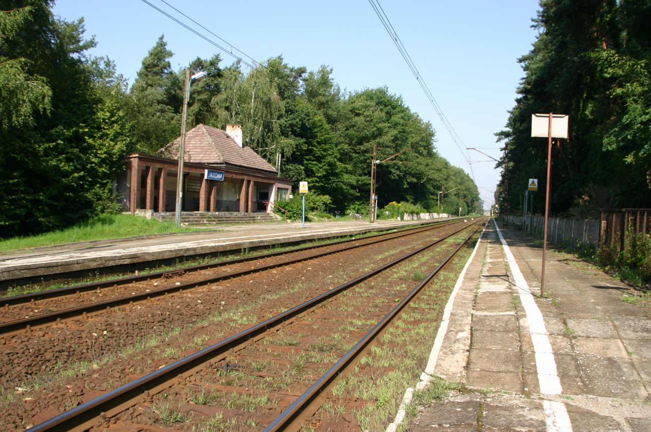 Železniční zastávka Jasiona, Polsko